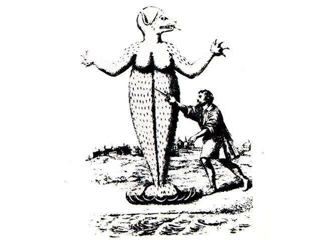 O monstro marinho Ipupiara, figura mítica pertencente ao livro Historia da provincia Sancta Cruz, de Pero de Magalhães Gândavo, de 1576.